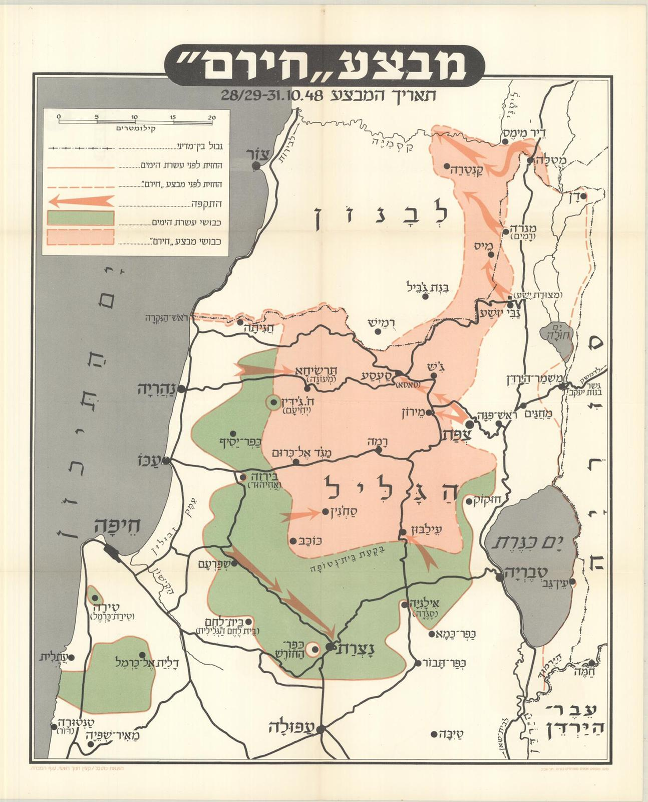 מבצע חירם.